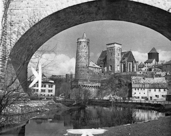 Zentralbild-Klein 15.5.52, Stadtbilder aus Bautzen. Bautzen mit seinen vielen Türmen, alten Gebäuden und den Barockwohnhäusern entwickelte sich aus der slawischen Landesfeste Budissin und ist heute das Verwaltungs- und Kulturzentrum der sorbischen Volksgruppe. Stadtbilder aus Bautzen. Blick auf den Wasserkunstturm und die im 15.Jahrhundert erbaute Michaeliskirche.